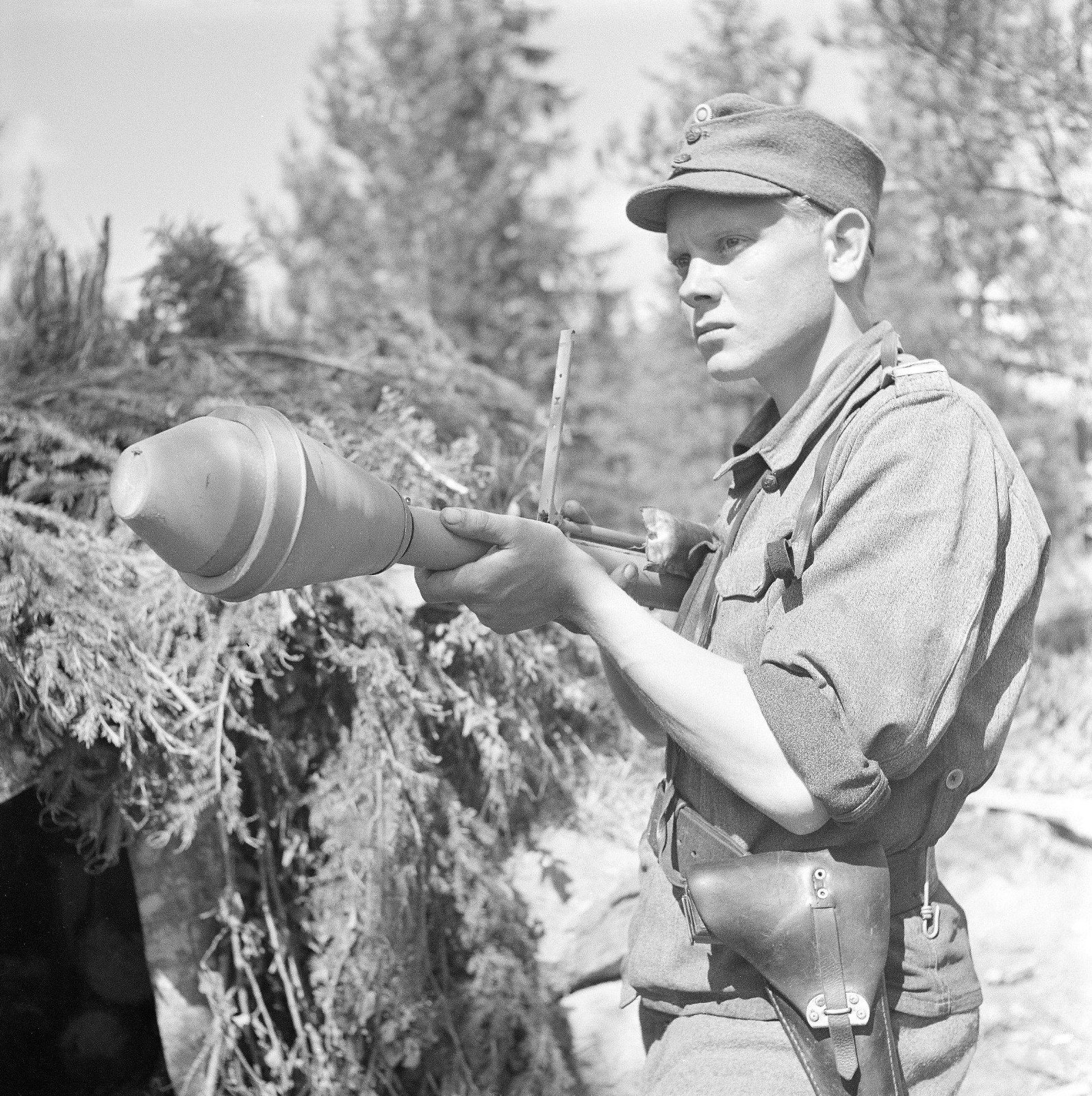 Alikersantti Franz Haapala panssarinyrkillä torjui IS-mallisen raskaan panssarivaunun Vuosalmen taistelussa. SA-kuvat